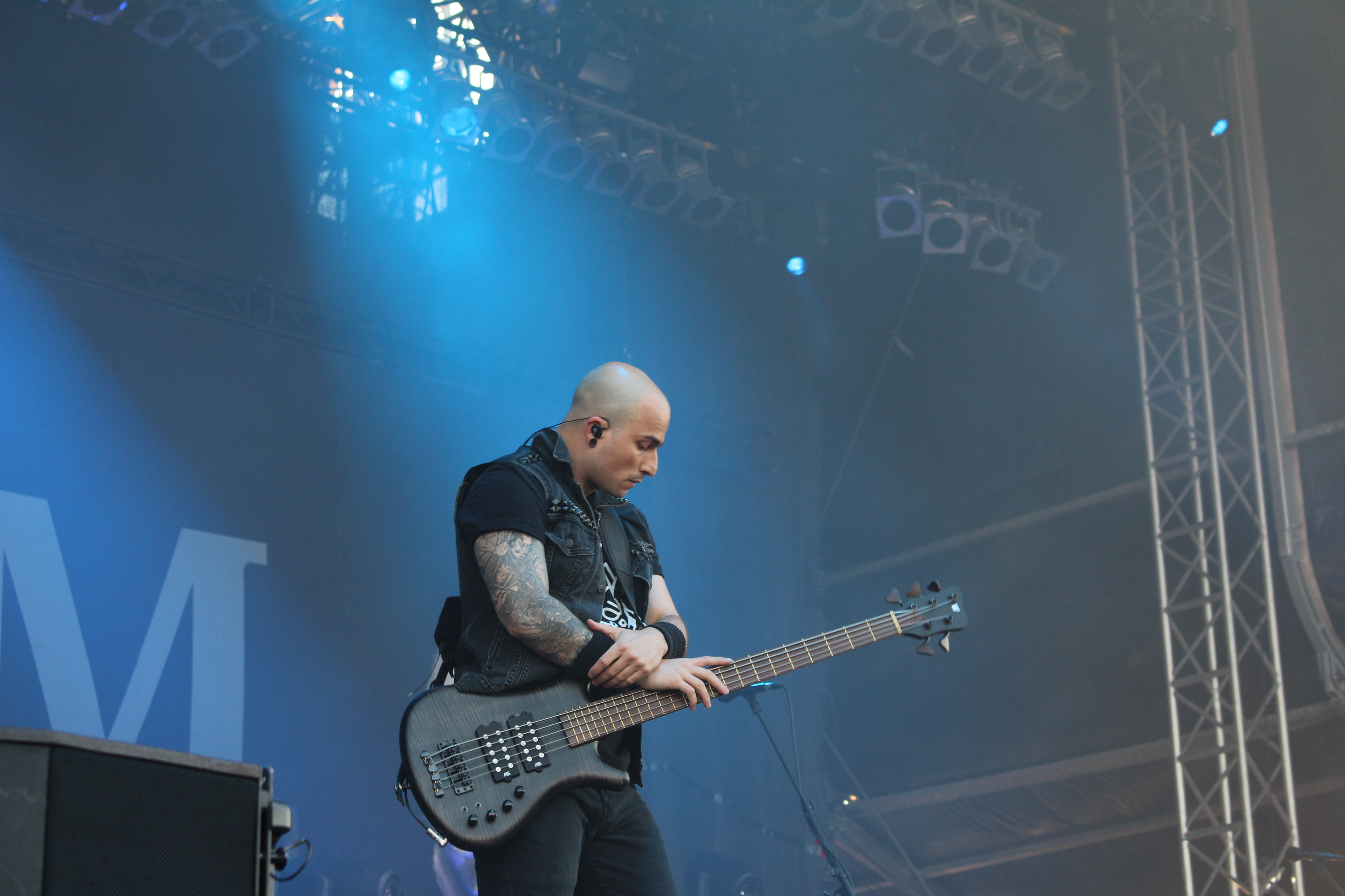 Festivalsommer This photo was created with the support of donations to Wikimedia Deutschland in the context of the CPB project "Festival Summer". Personality rights warningAlthough this work is freely licensed or in the public domain, the person(s) shown may have rights that legally restrict certain re-uses unless those depicted consent to such uses. In these cases, a model release or other evidence of consent could protect you from infringement claims.